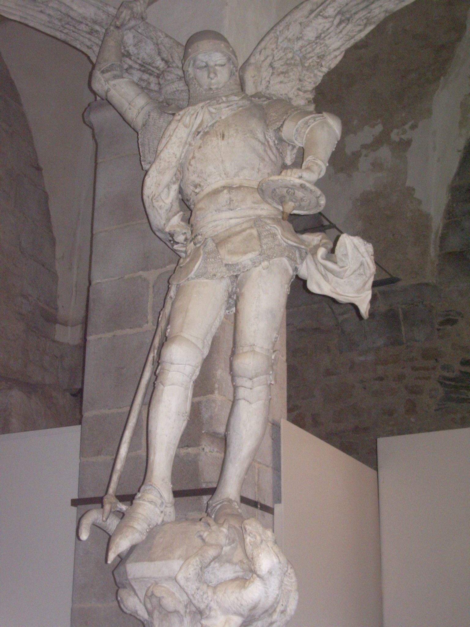 Statue de l'Archange Saint-Michel dans le Mont Saint-Michel